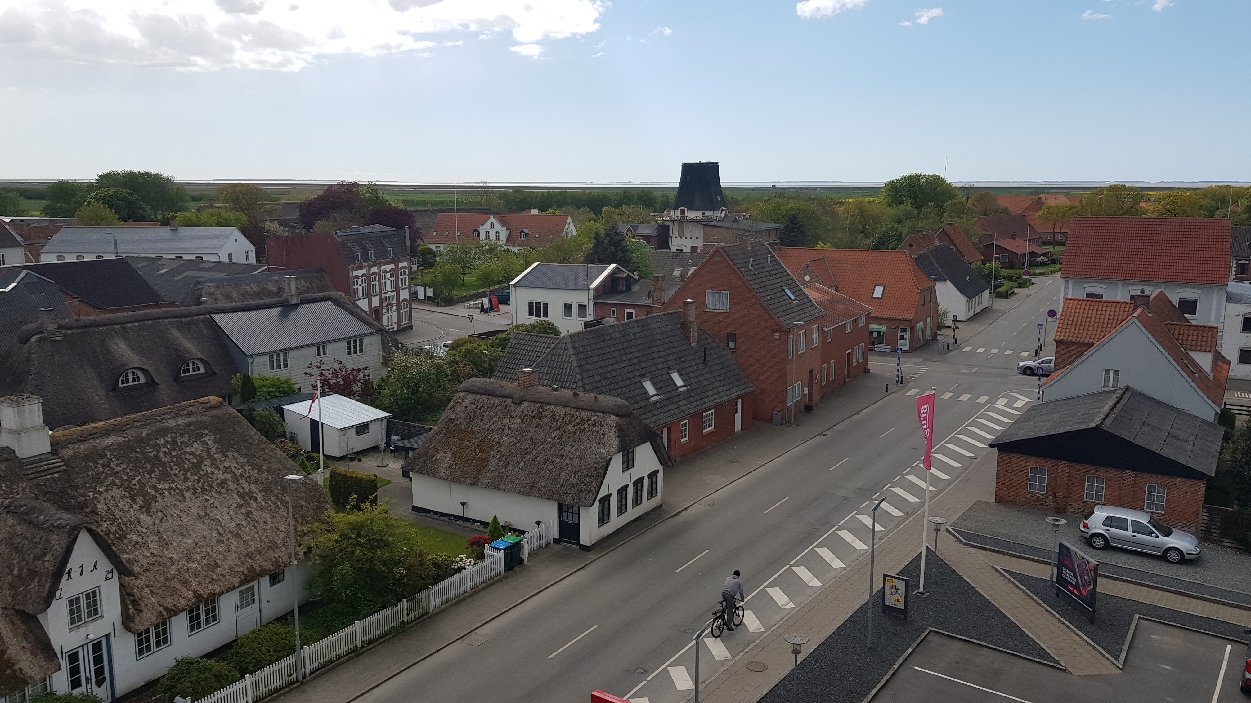 Udsigt fra Højer Vandtårn